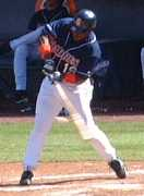 Tony Gwynn at bat